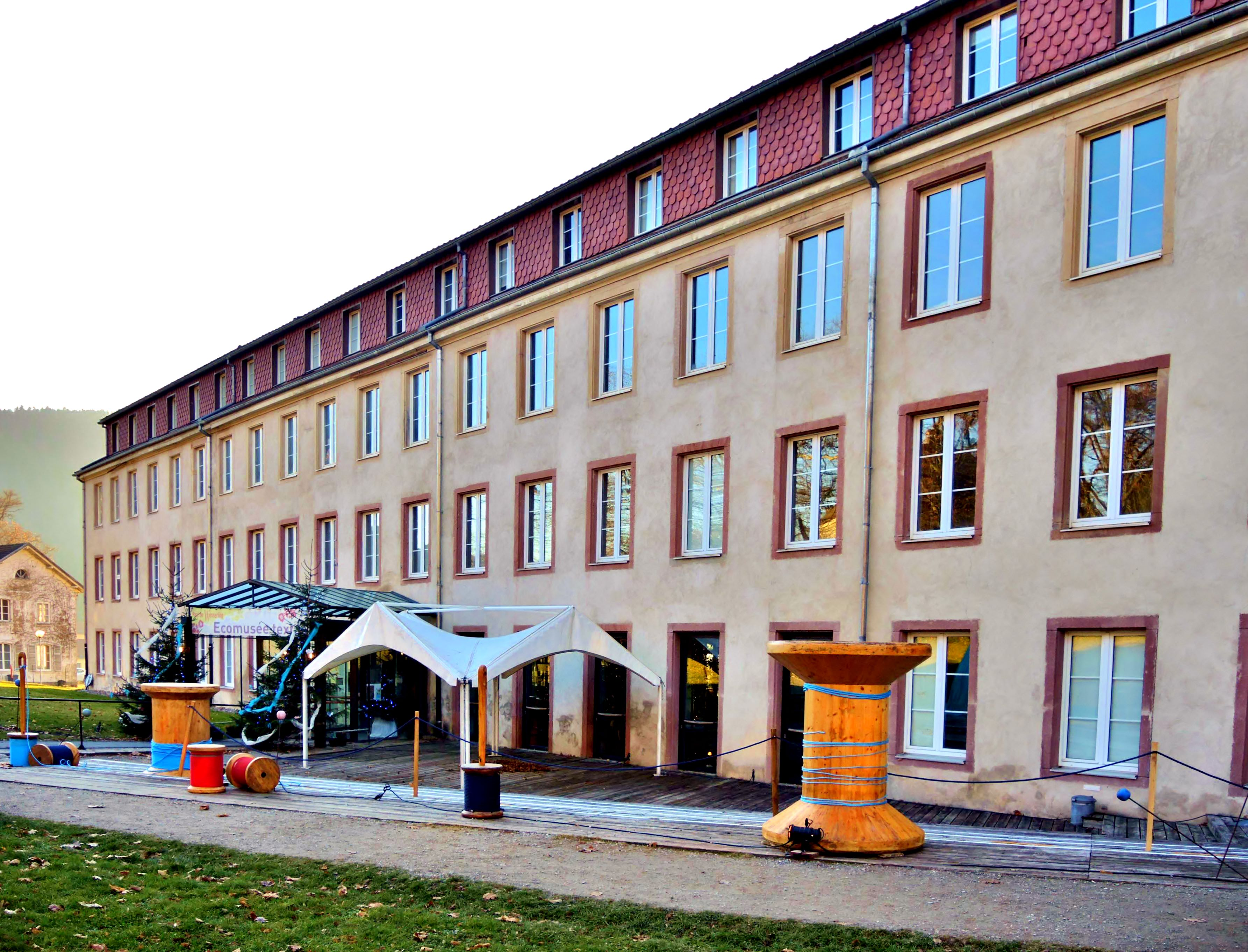 Autre vue du bâtiment abritant le musée du textile.